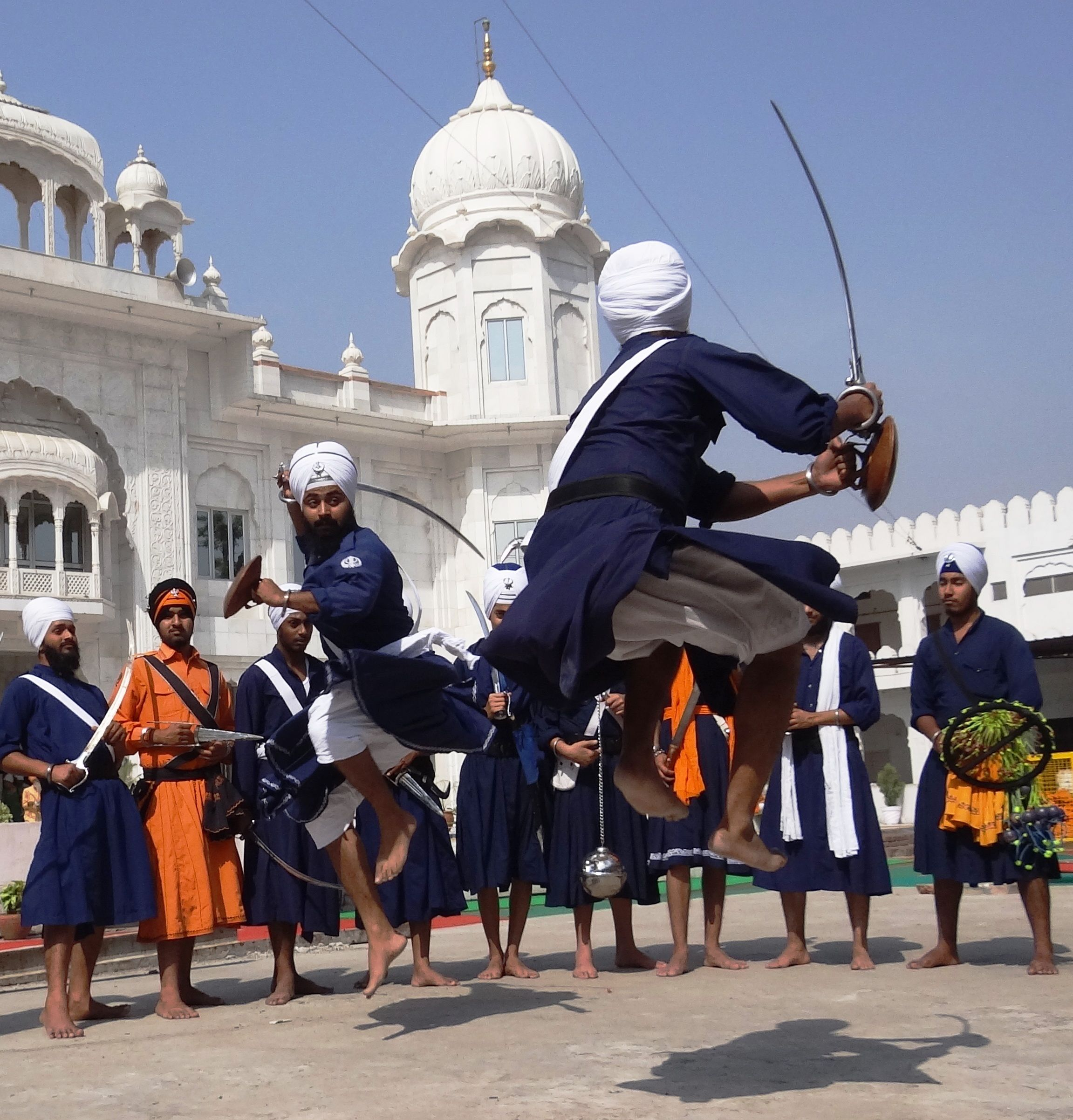 les sikhs pratique du Gatka